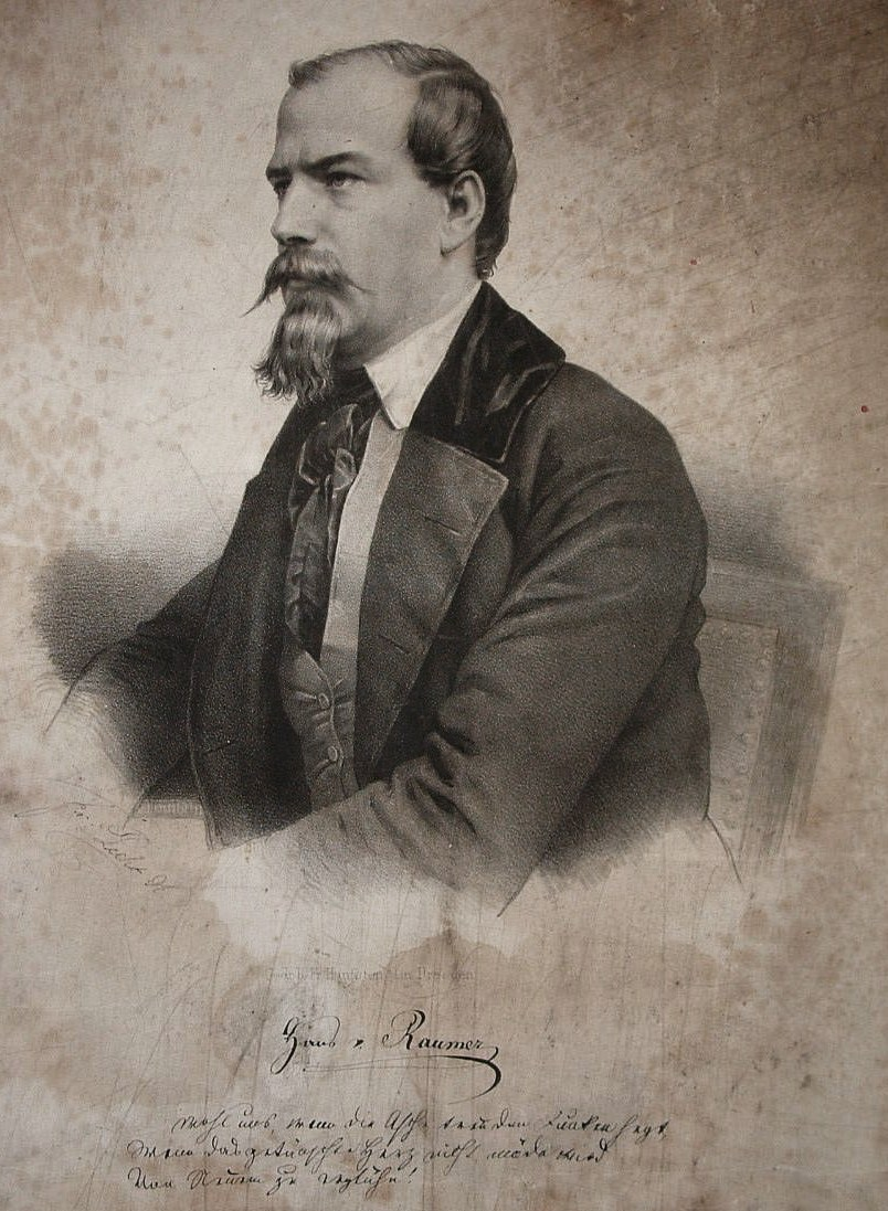 Porträt des Politikers Hans von Raumer